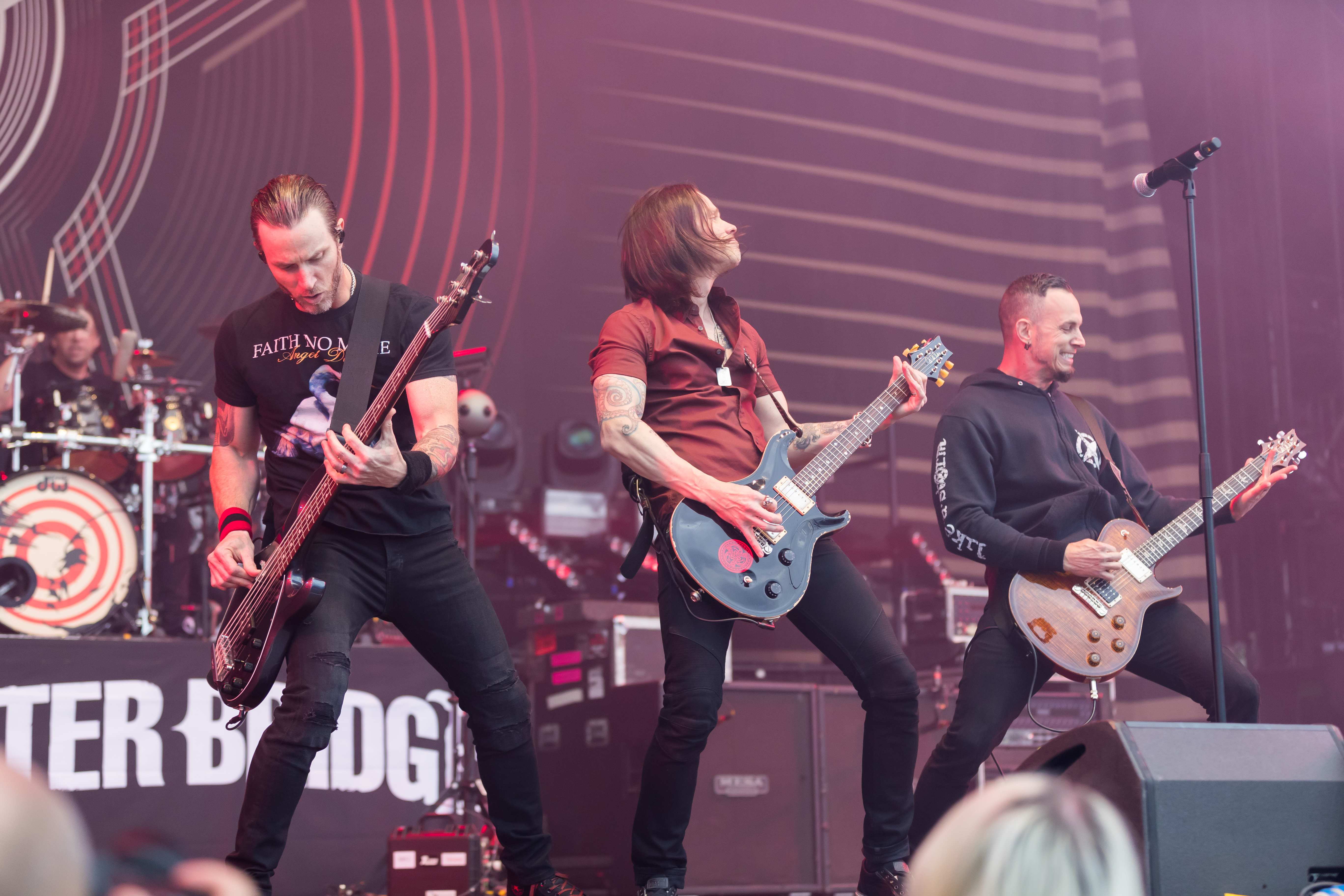 Alter Bridge during Rock am Ring at Nürburgring, Nürburg, Rheinland Pfalz, Germany on 2017-06-04, Photo: Sven Mandel